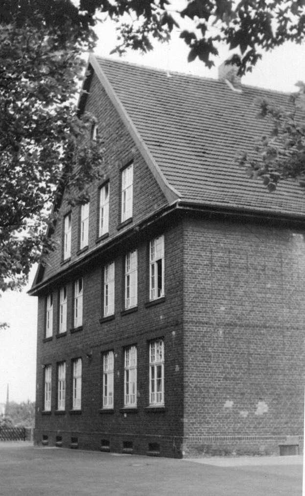 Scann von einem Foto Pestalozzischule Duisburg im Jahr 1958, damals als Gebäude der Realschule Rheinhausen genutzt (nur erster 5er Jahrgang). Heute eine Grundschule